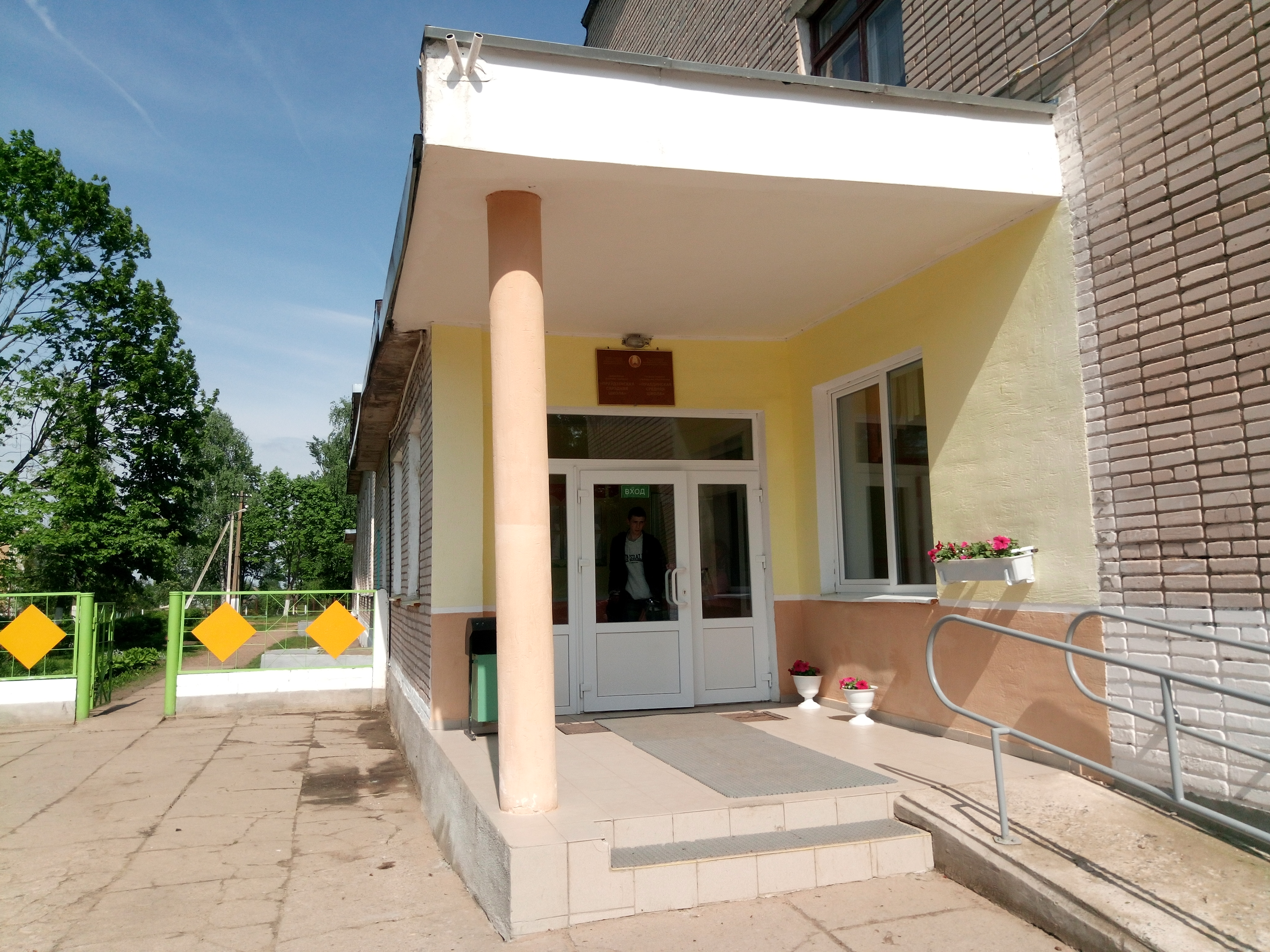 Праўдзінская сярэдняя школа, галоўны ўваход.